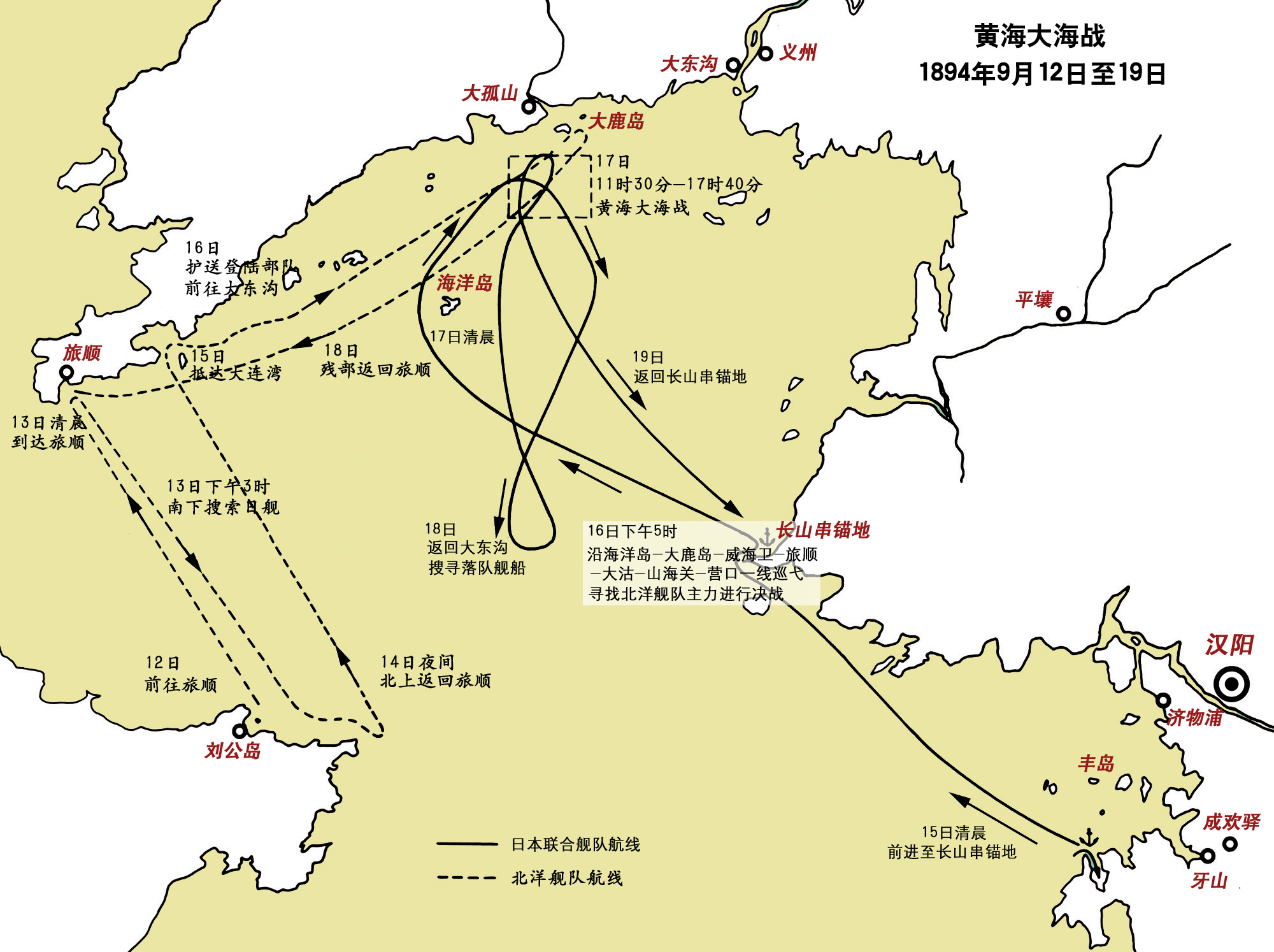 甲午战争中的黄海海战示意图。